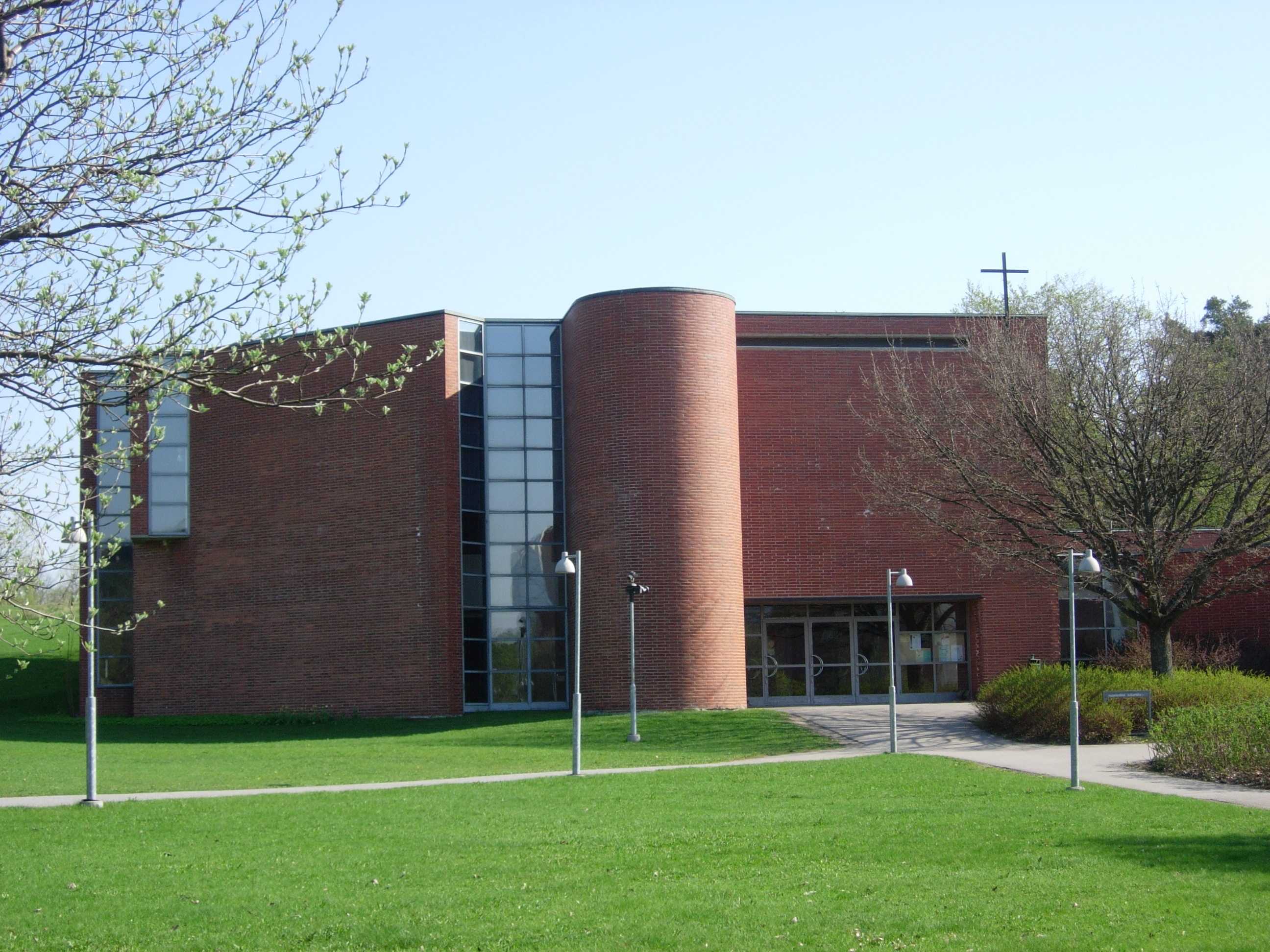 Henrikin kirkko, Turku